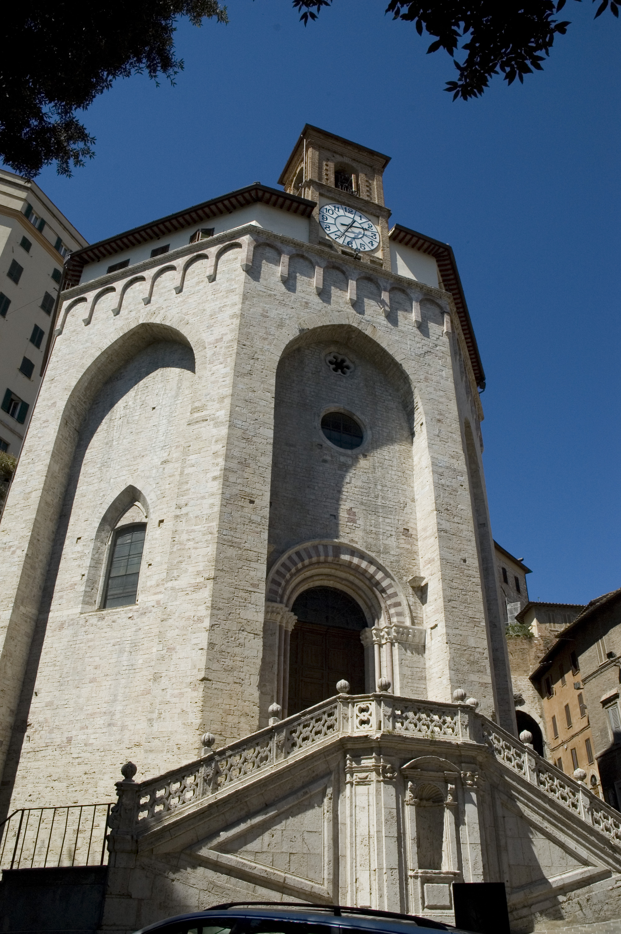 Perugia, Chiesa di Sant'Ercolano